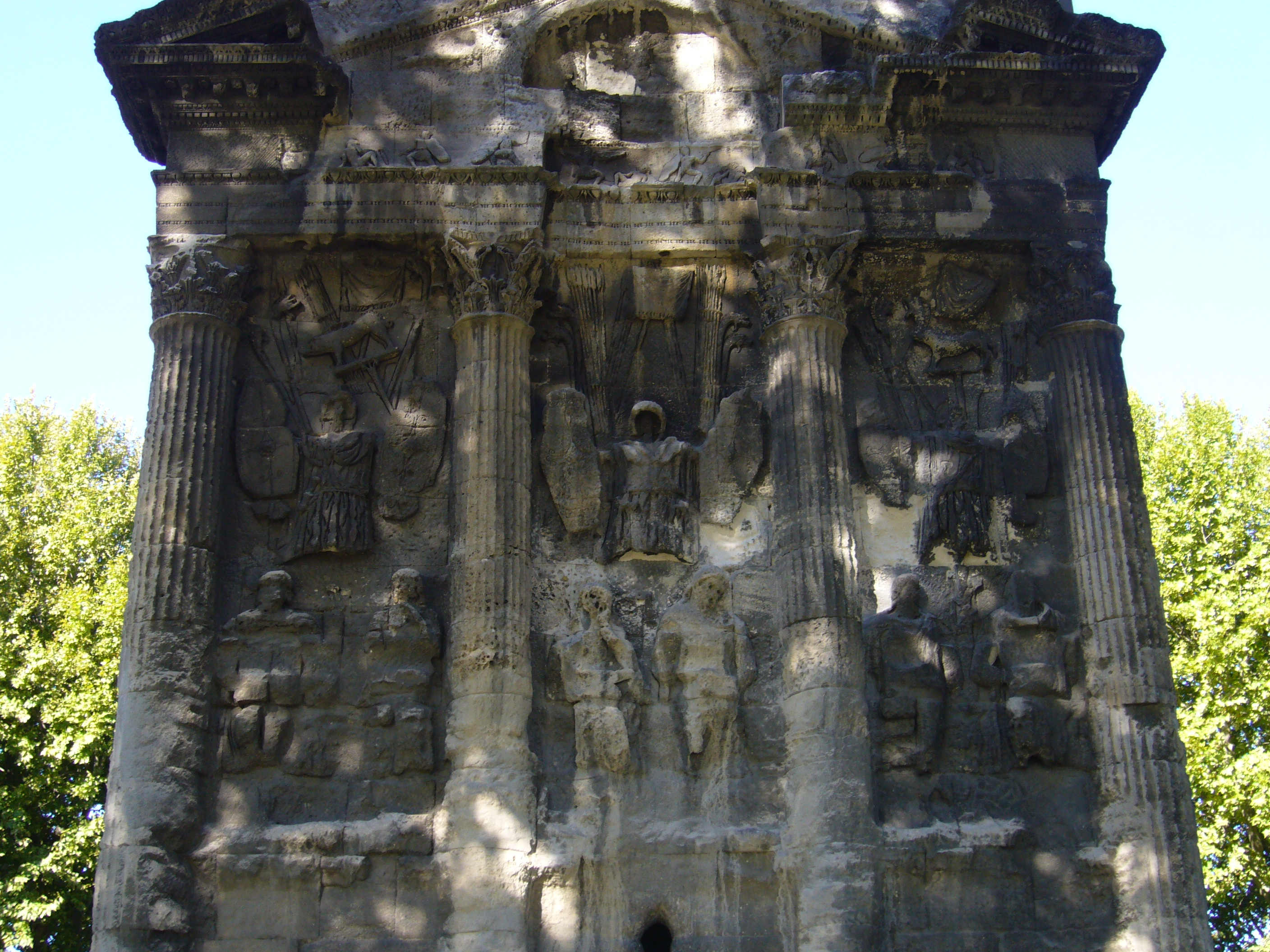 Arc d’Orange, façade de l’est.